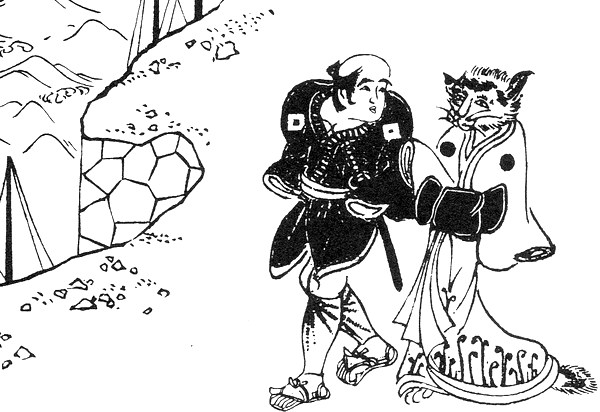 Bakeneko-yūjo (化猫遊女) from the Urikotoba (売言葉)